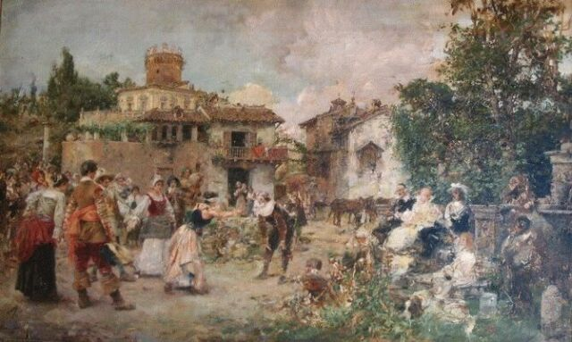 Vicente March (1859 - 1927) - La gallina ciega Fuente En el dominio público por antigüedad